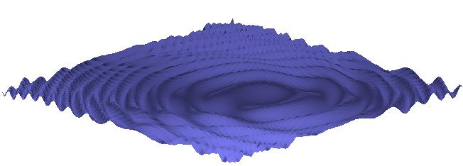 Priklad interference kruhovych vln